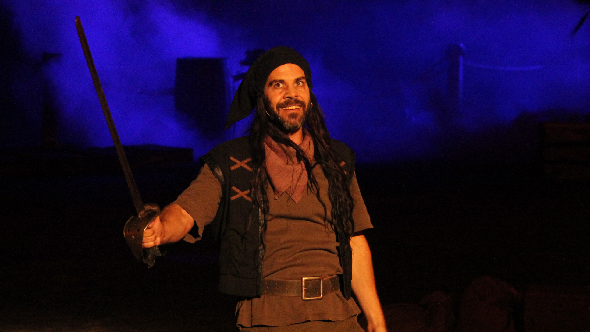 Espen Løvås as Glade Gorm in Kaptein Sabeltann og Grusomme Gabriels Skatt